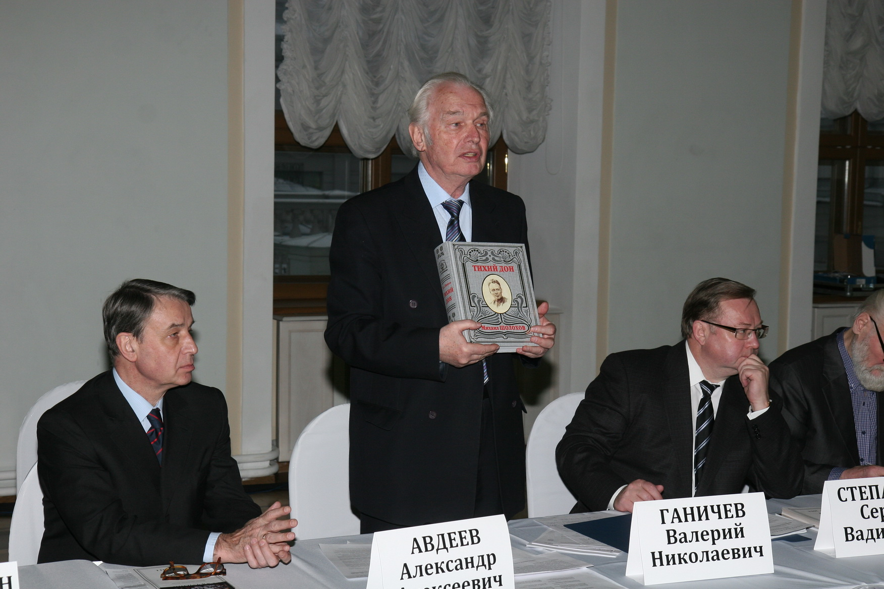 1-го декабря 2011 года в Российской Государственной библиотеке («Дом Пашкова») состоялась торжественная церемония вручения Большой литературной премии России за 2011 год